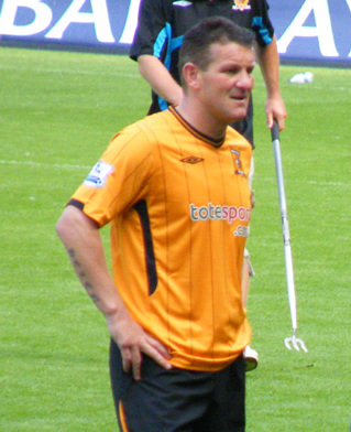 Dean Windass